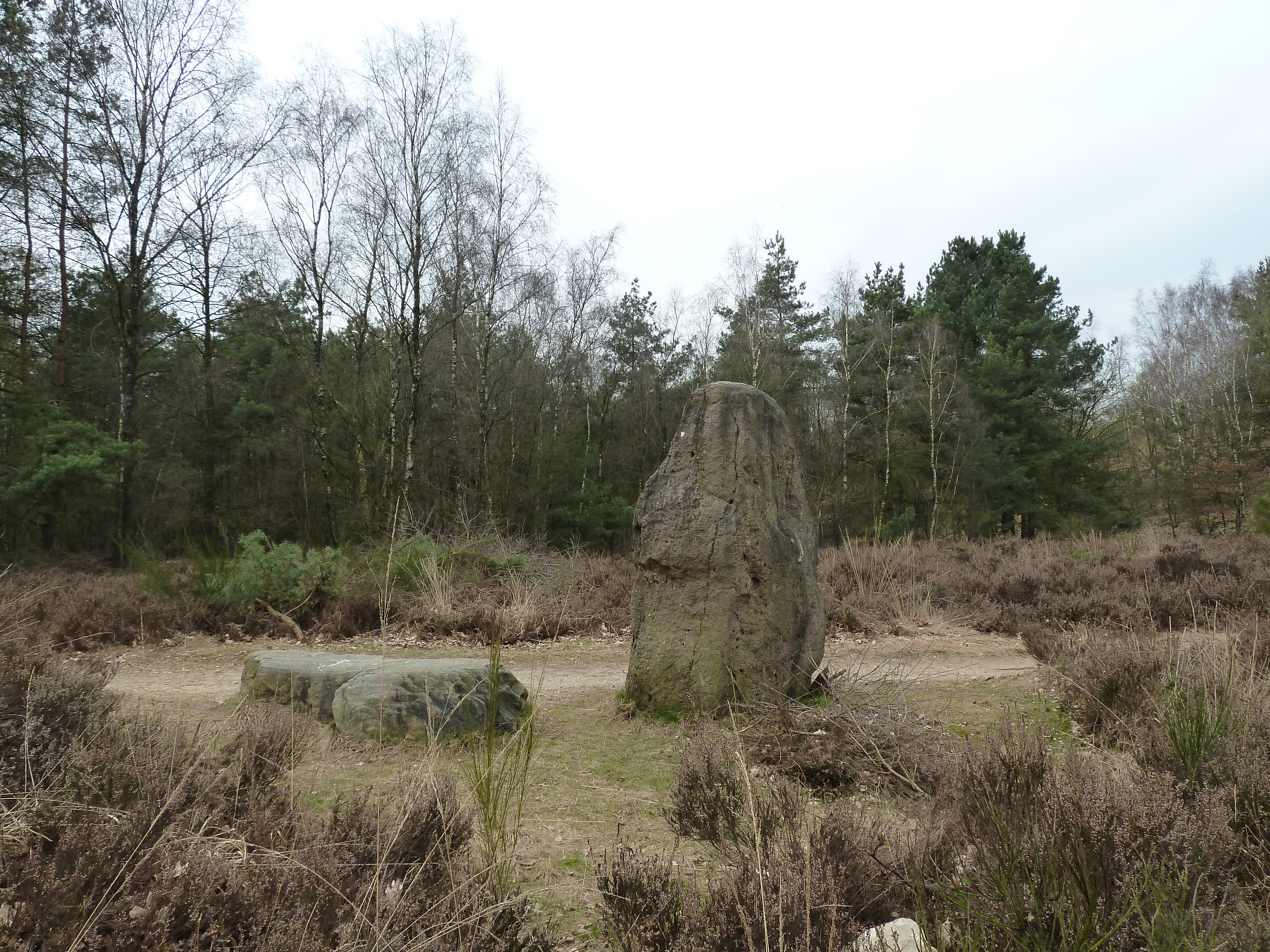 Stenen op de Mechelse Heide, Maasmechelen, Limburg, België